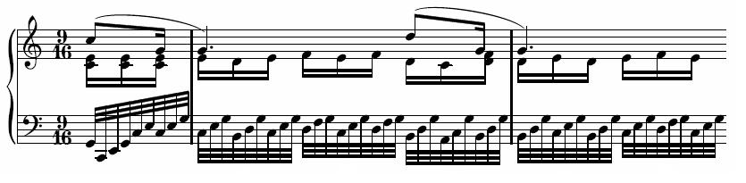 Sixième variation de l'arietta de la Sonate pour piano nº 32 de Beethoven